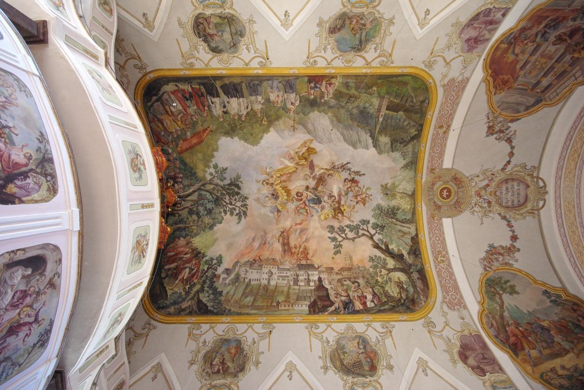 Kardinal-von-Faulhaber-Platz 1, 83313 Siegsdorf, Innenraum Pfarrkirche Mariä Empfängnis. Genehmigung für Innenaufnahmen durch Erzbischöfliches Ordinariat München, Ressort Bauwesen und Kunst vom 21.08.2012 liegt schriftlich vor.This is a photograph of an architectural monument.